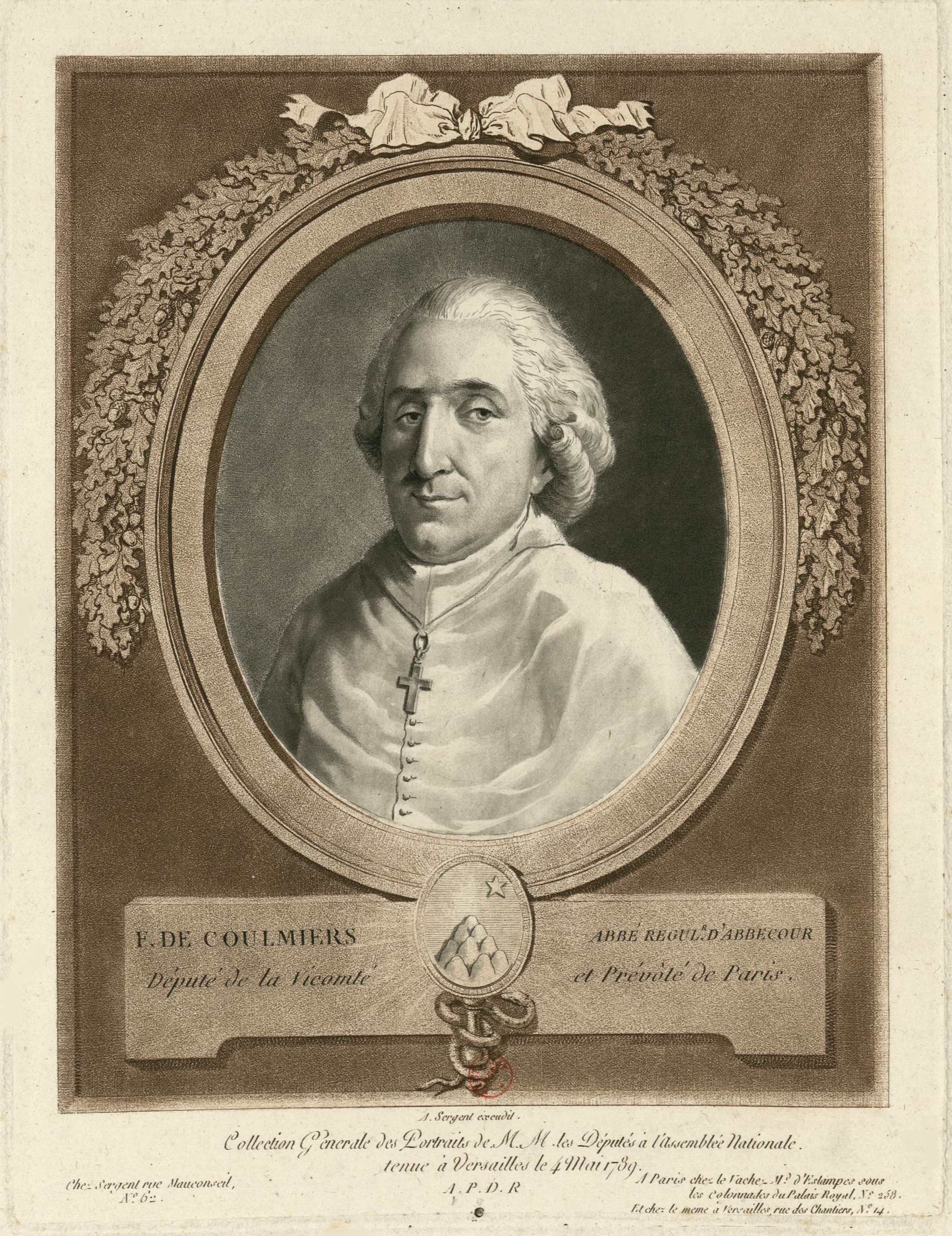 Portrait F. S. de Coulmiers